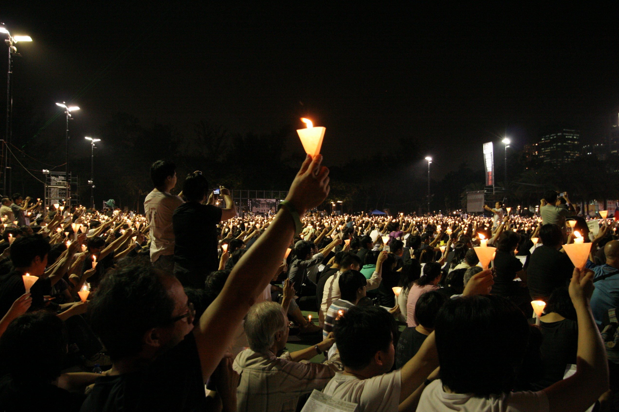 近年来最大规模的一场纪念六四活动2012年6月4日在香港举行。活动组织者说，多达18万人出席了在港岛维多利亚公园举行的这场烛光悼念活动，其中许多人来自中国大陆。